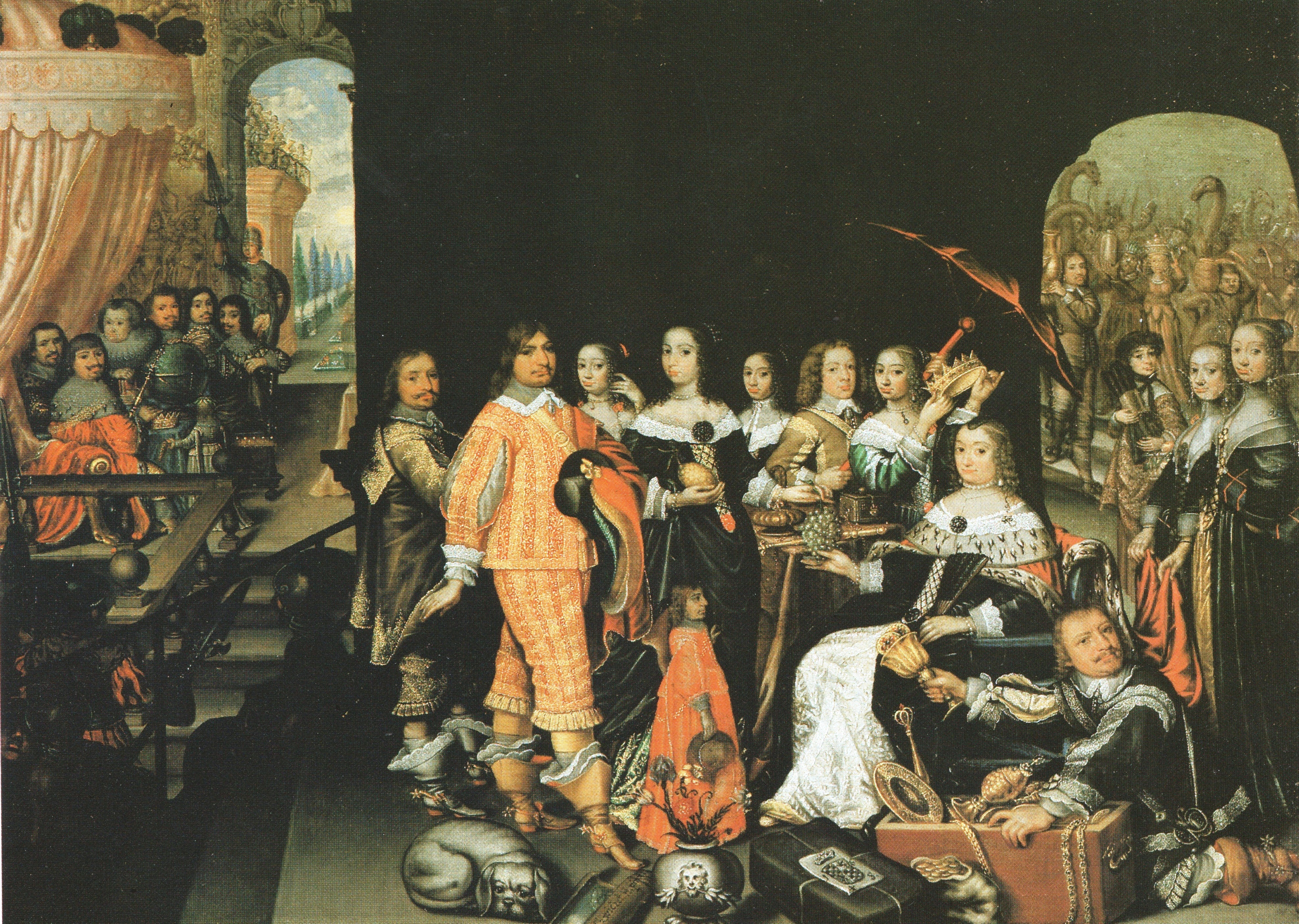 Im Zentrum Friedrich Wilhelm, der große Kurfürst mit Gemahlin Louise Henriette. Seine Mutter Elisabeth Charlotte rechts auf dem Thron, ihr zu Füßen Ludwig Philipp von der Pfalz. Hinten links die brandenburgischen Vorfahren, rechts hinten die niederländischen Ahnen.